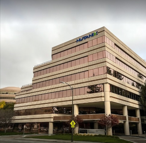 Nutanix Headquarter